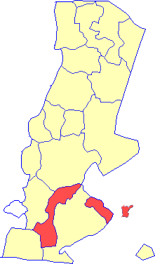 Resaltado en rojo, aparece la jurisdicción del Municipio de La Unión.